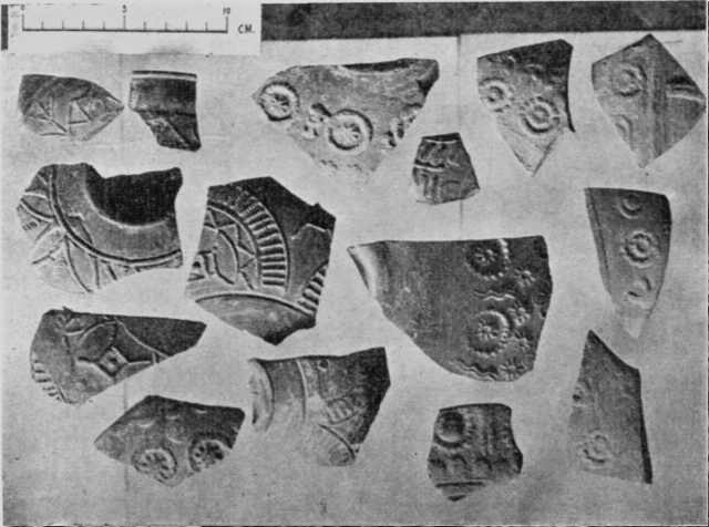 terra sigillata